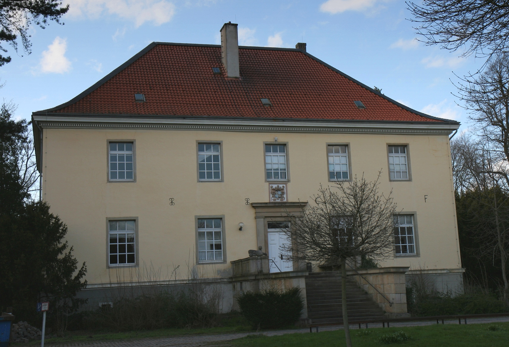 Haus Busch in Hagen.